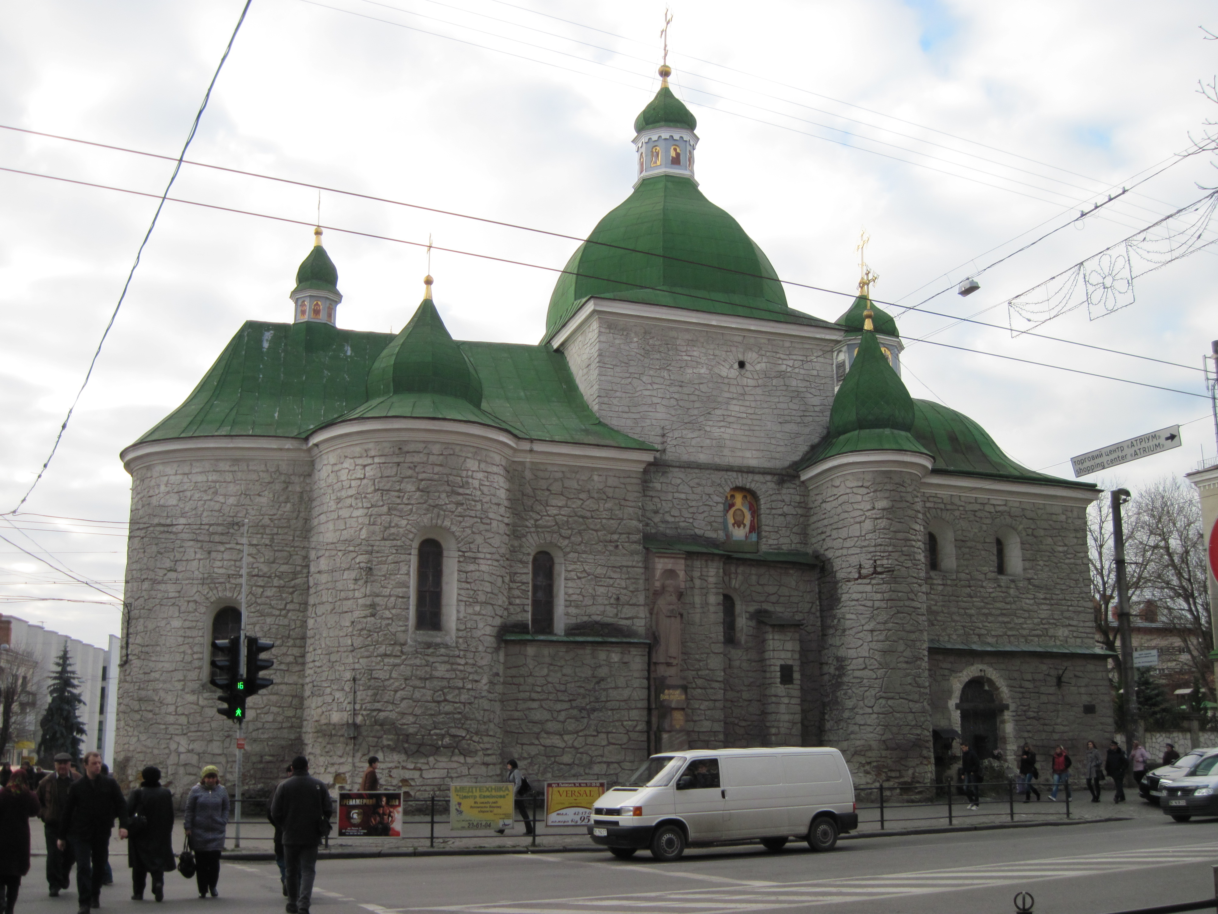 Церква Різдва (Середня), Тернопіль, осінь 2013